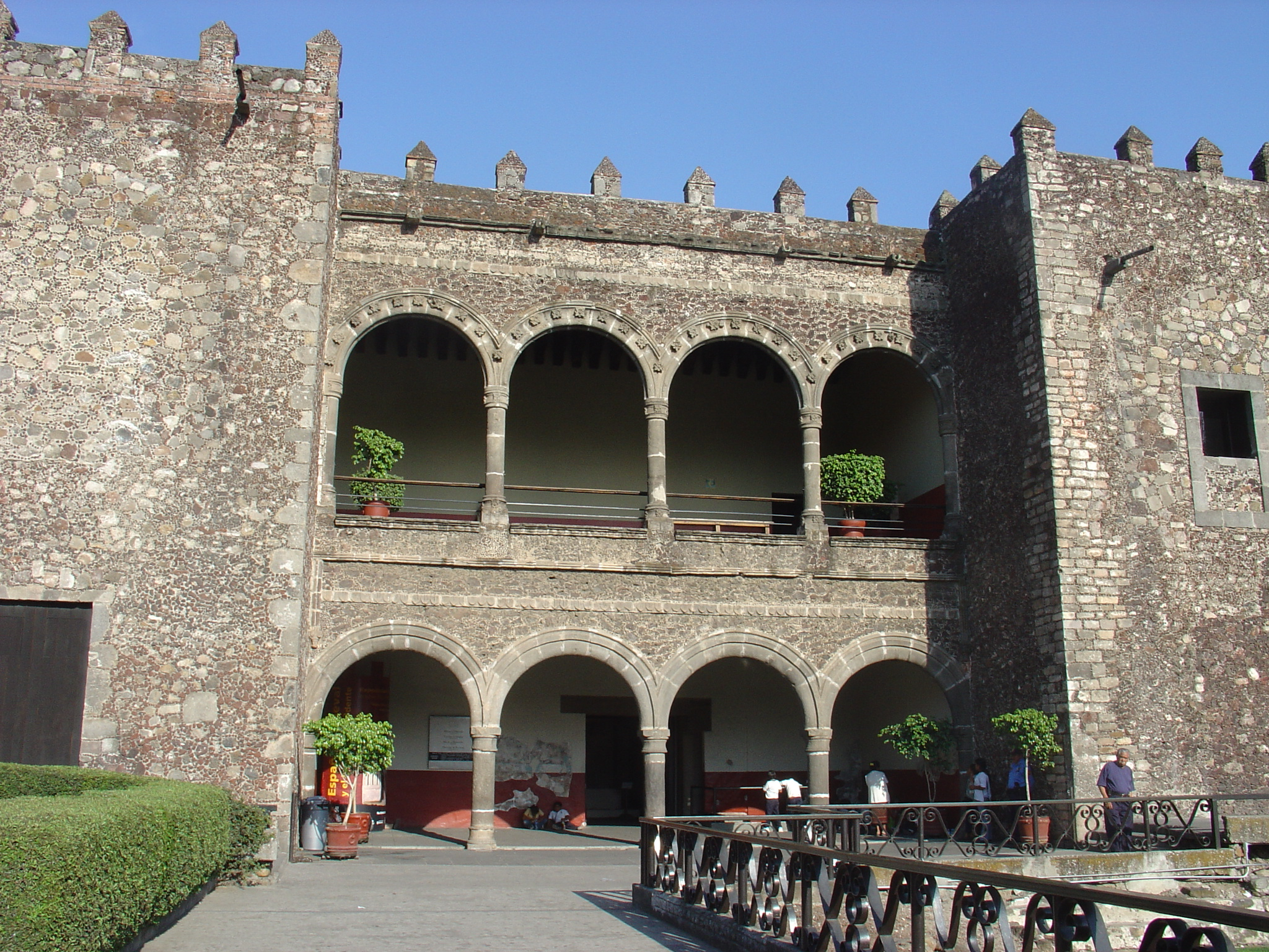 Fachada del palacio de Hernán Cortés